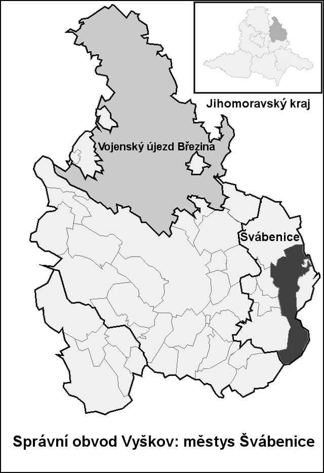 Hranice Švábenice (Vyškov- czech republic)